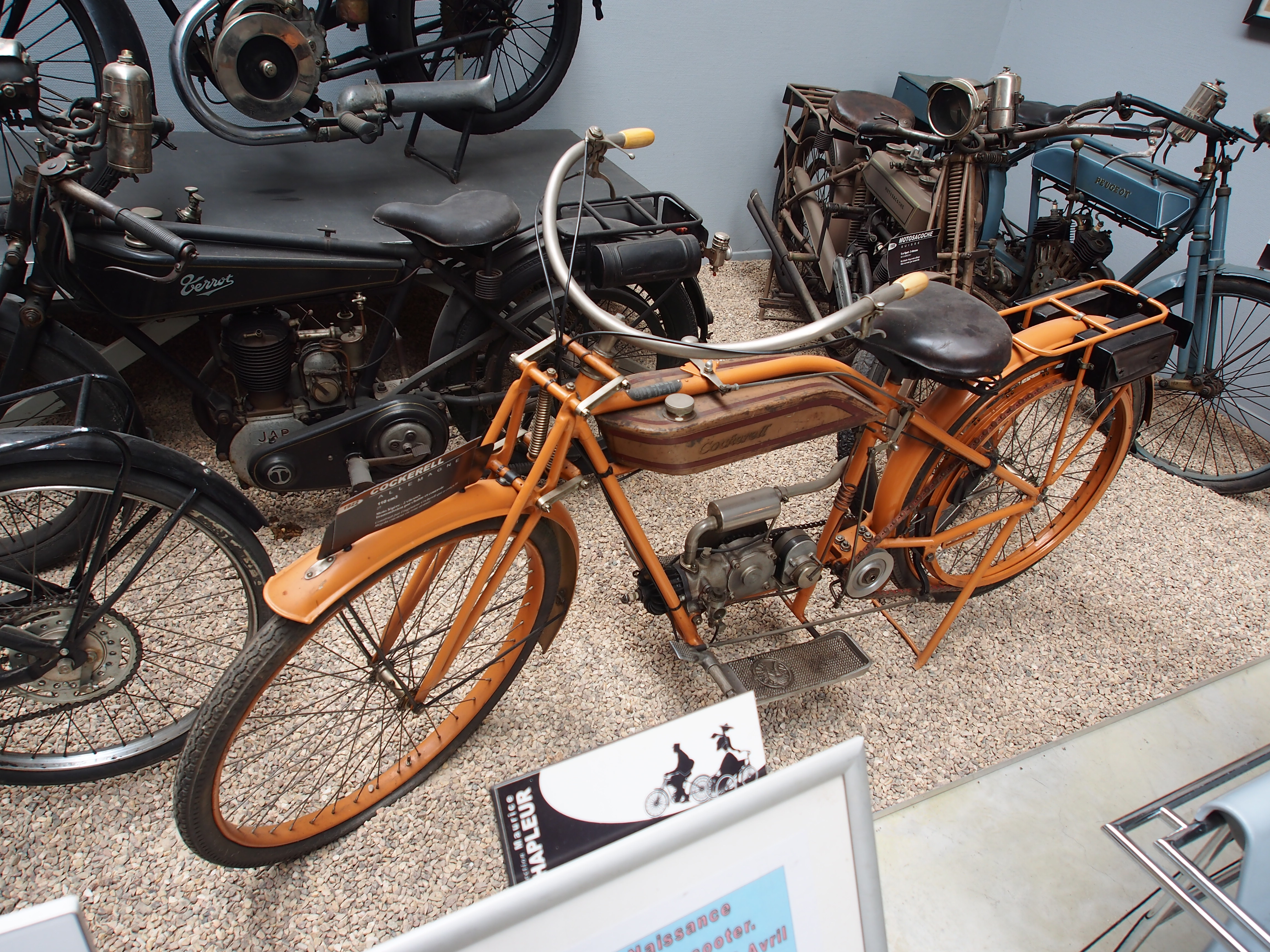 Photographed at the Musée de la Moto et du Vélo, Amneville, France.